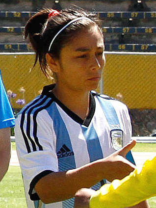 Fabiana Vallejos, capitana de la selección femenina de fútbol de Argentina en la Copa América 2014.